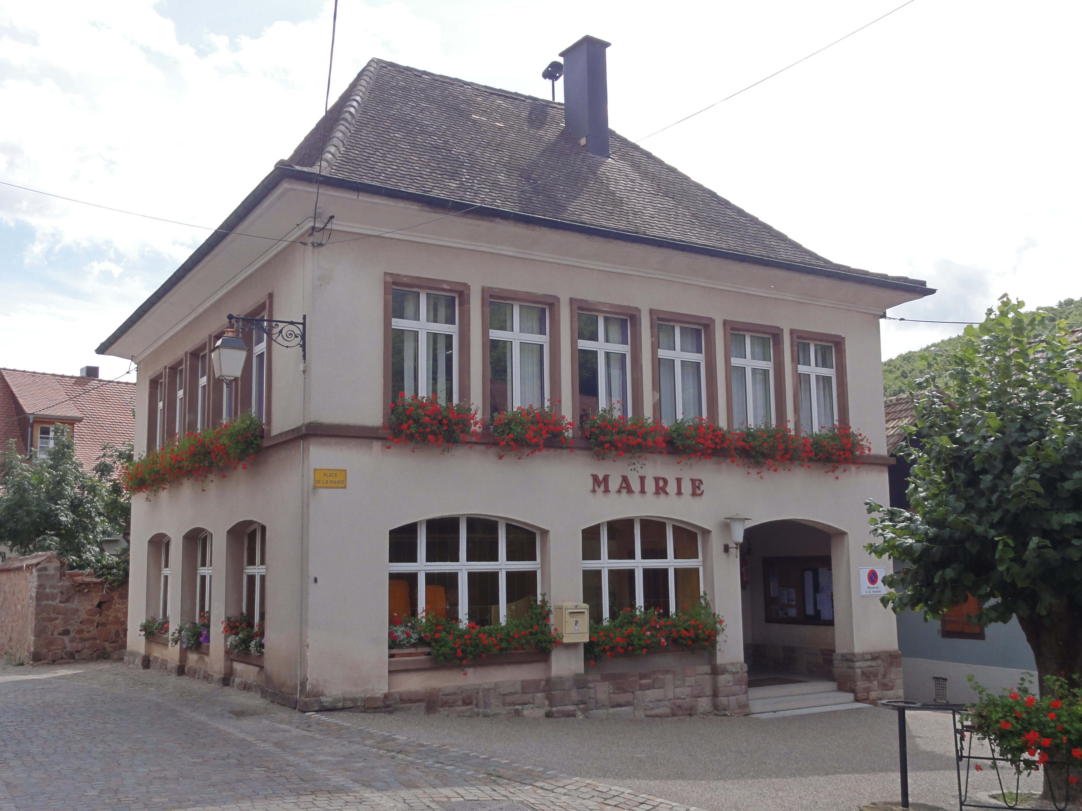 Alsace, Bas-Rhin, Reichsfeld, Mairie (XXe). .